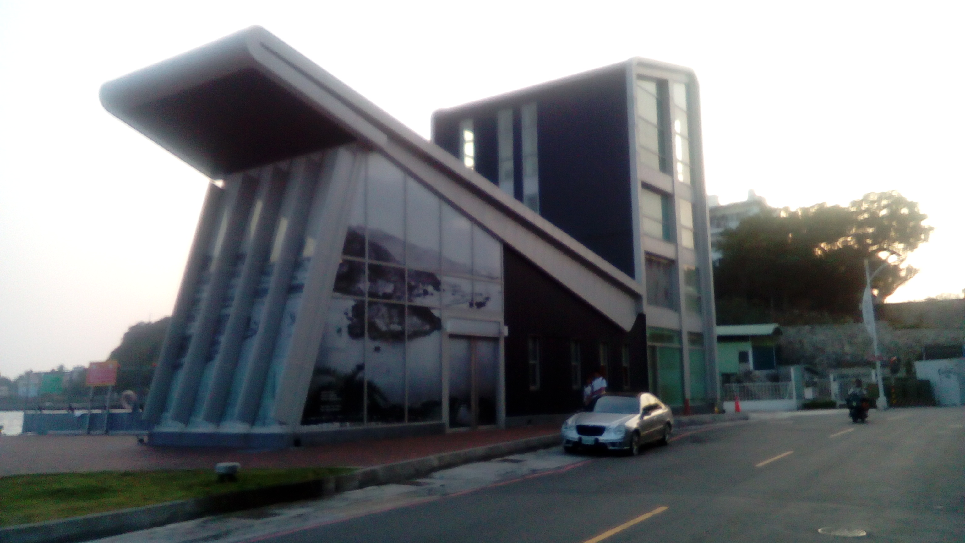 位於雄鎮北門及哨船頭公園間 2017年動工 2019年完成